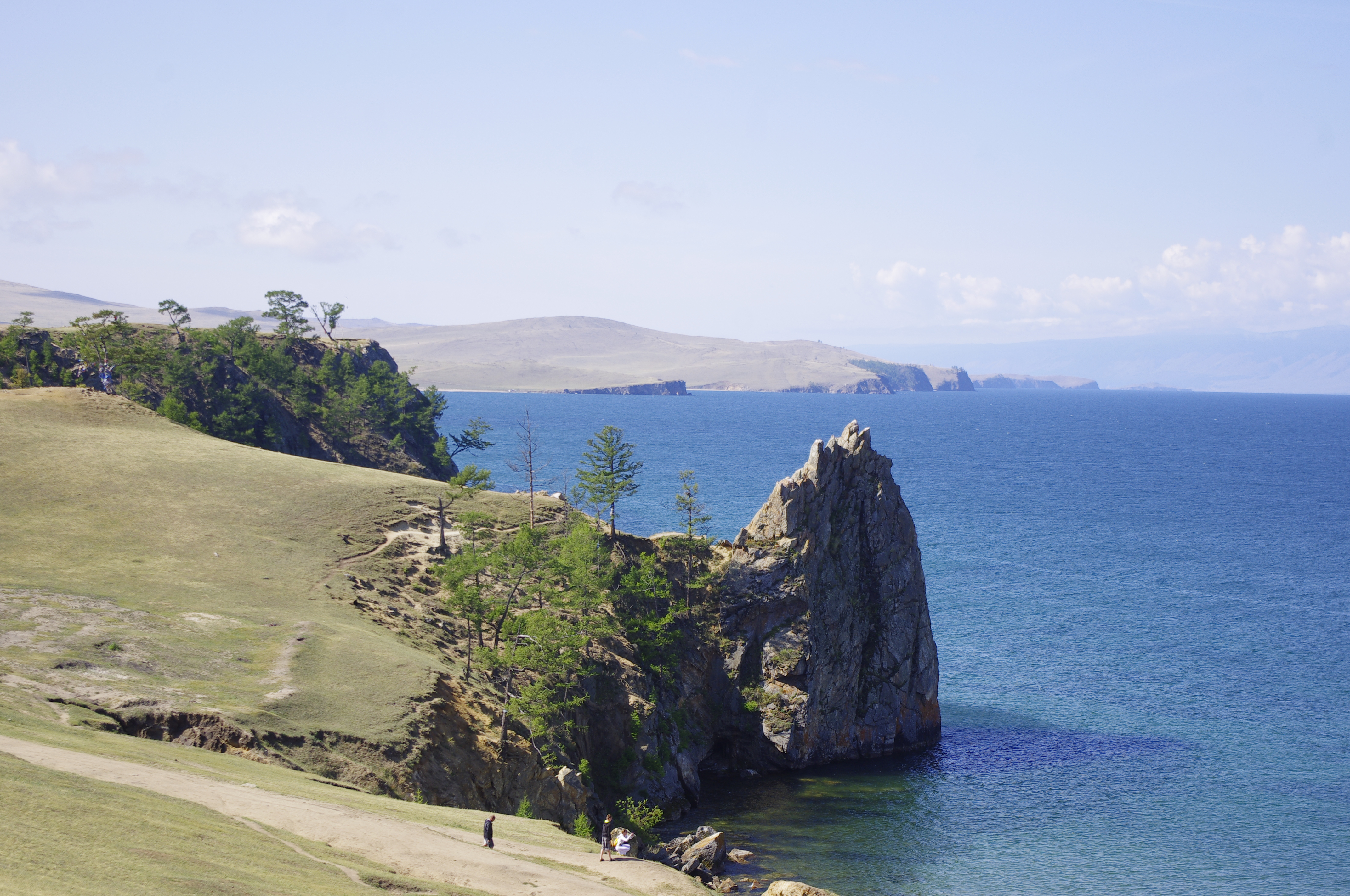 Lato 2013.